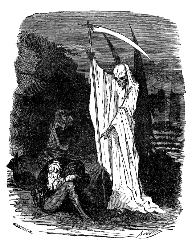 Illustration de Bertall pou le conte d'Andersen Le Jardin du Paradis